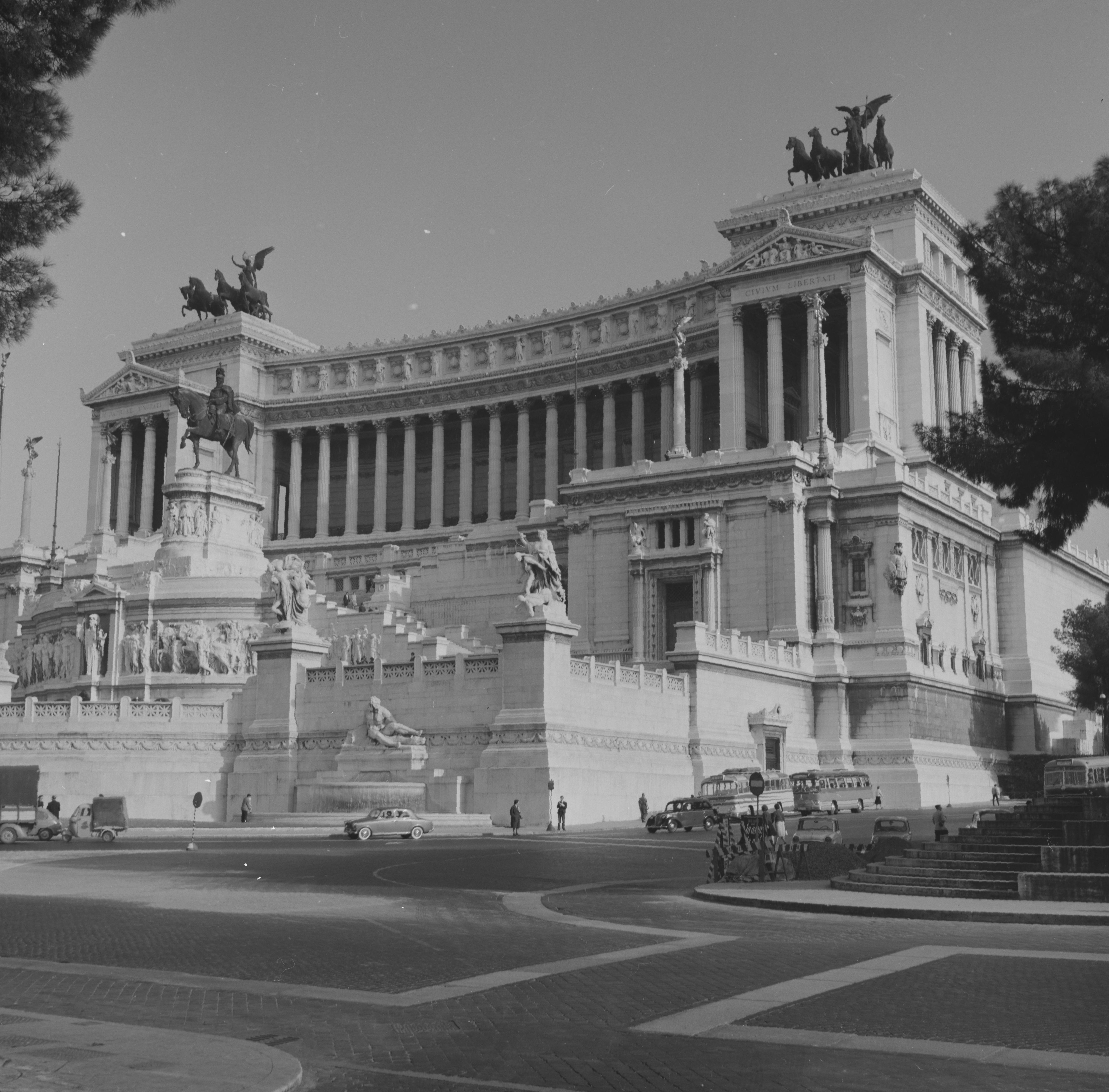 Bildet er hentet fra Nasjonalbibliotekets bildesamling. Anmerkninger til bildet var: Fotograf: E-KQ Roma